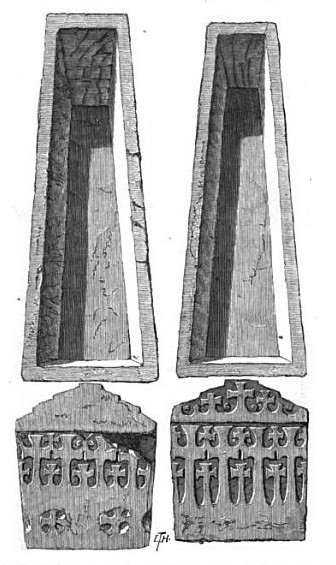 Tombeaux de Clovis et de Clotilde